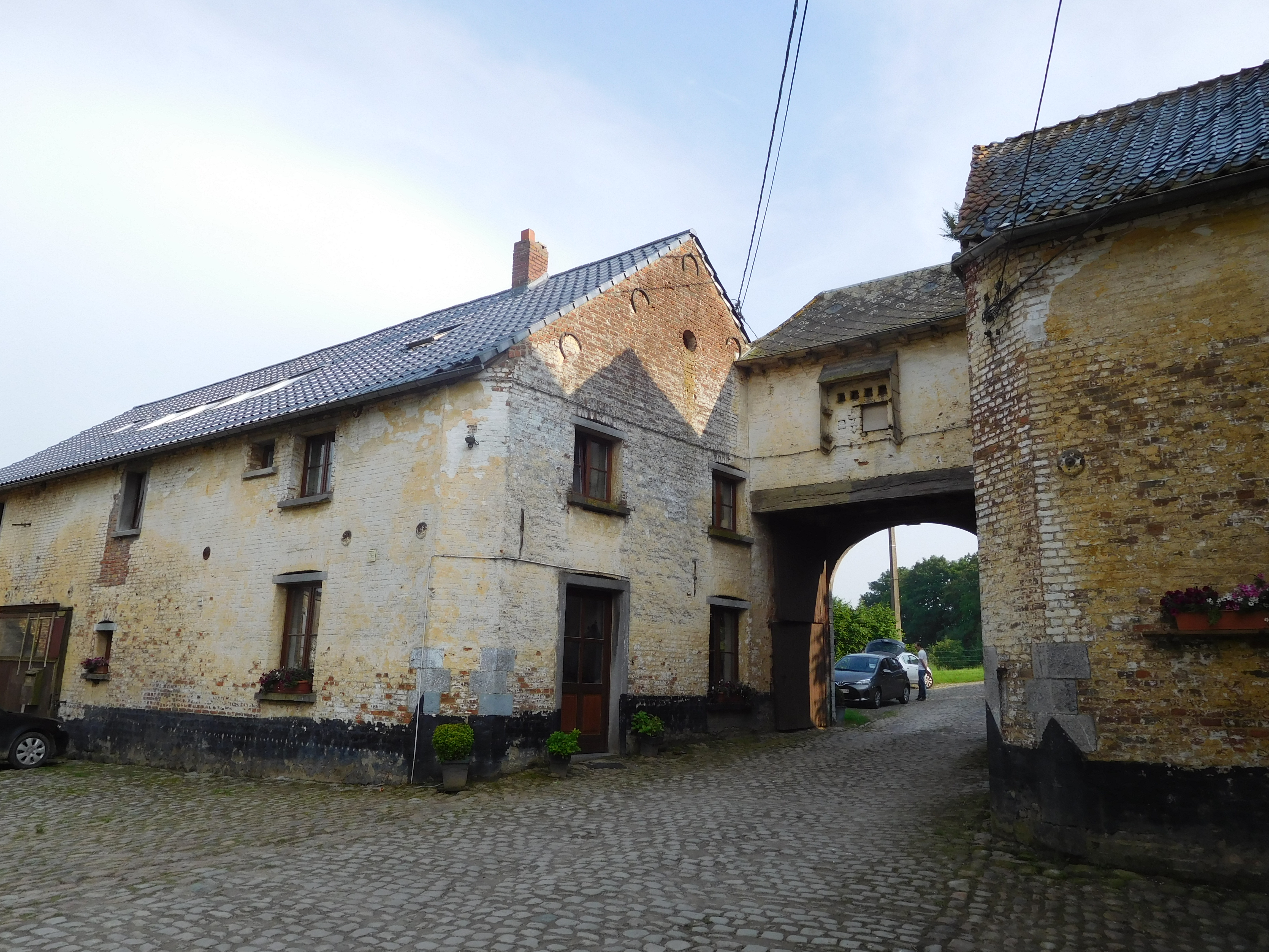 Une ferme traditionnelle à Mazy (Belgique): la Bourlotte